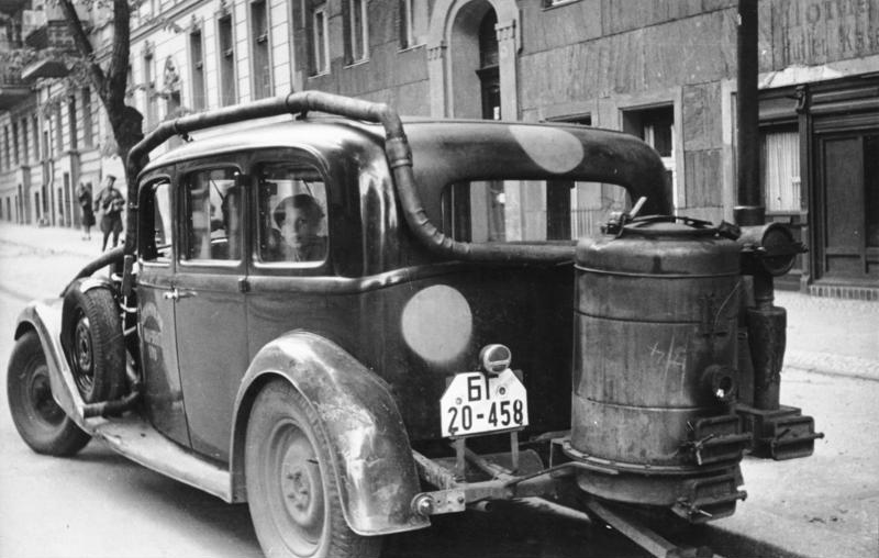 Berlin, Auto mit Holzgasantrieb ADN-ZB/SNB Pkw mit Holzgasantrieb in Berlin 1946